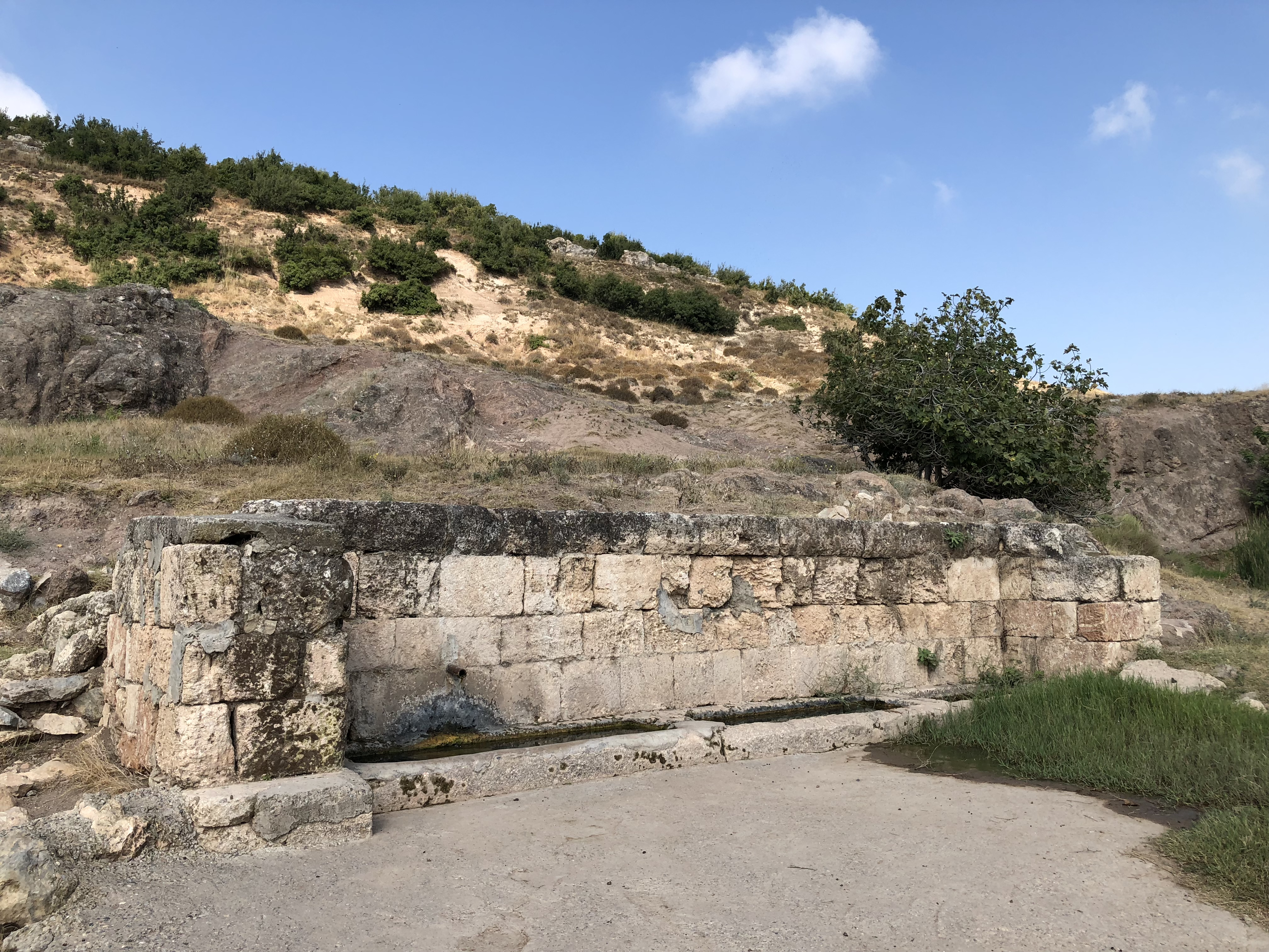 Hacı Fatma Çeşmesi, Kurtkulağı